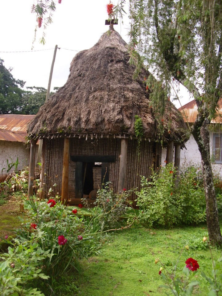 Batoufam, Cameroon